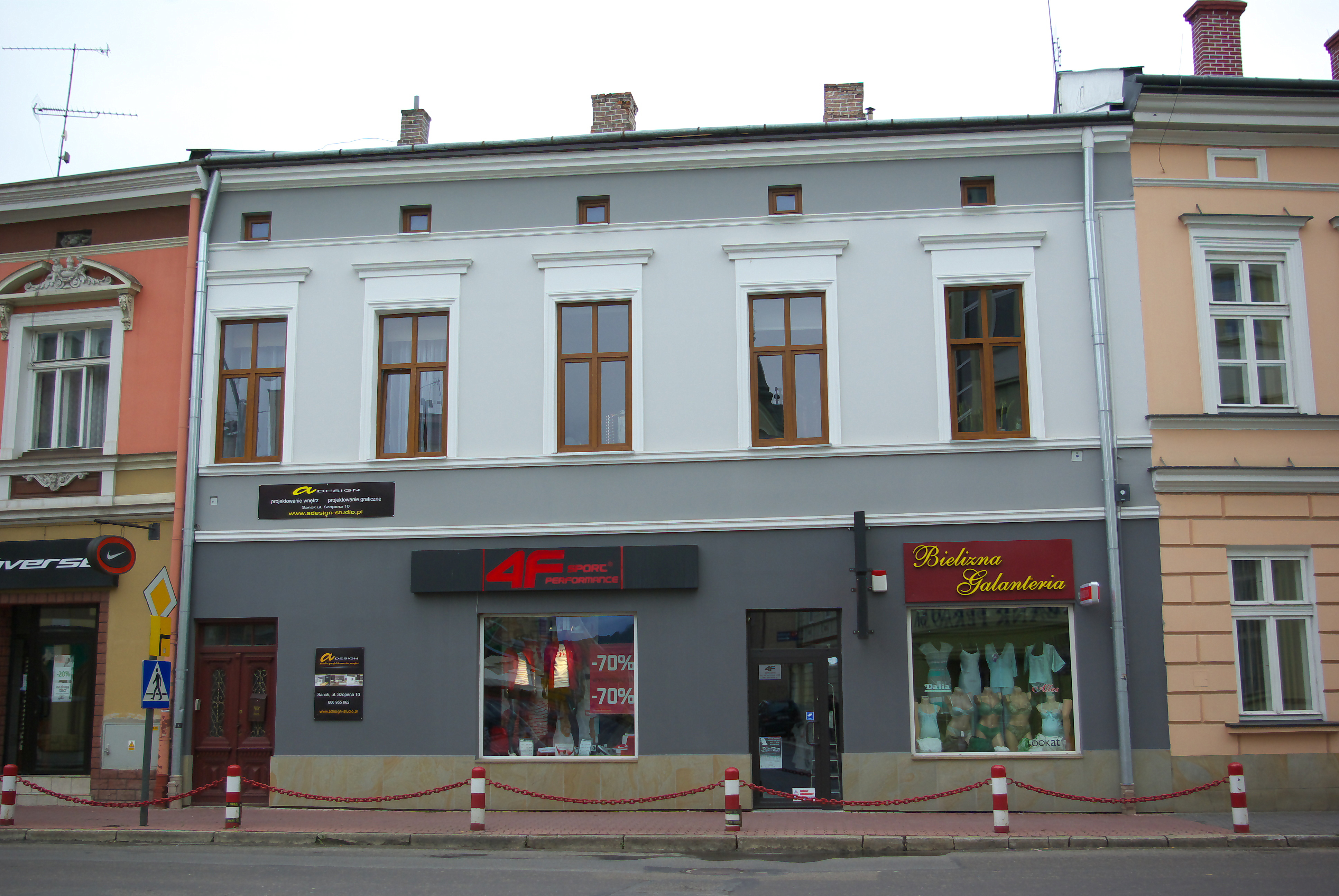 Budynek przy ulicy Kościuszki 3 w Sanoku